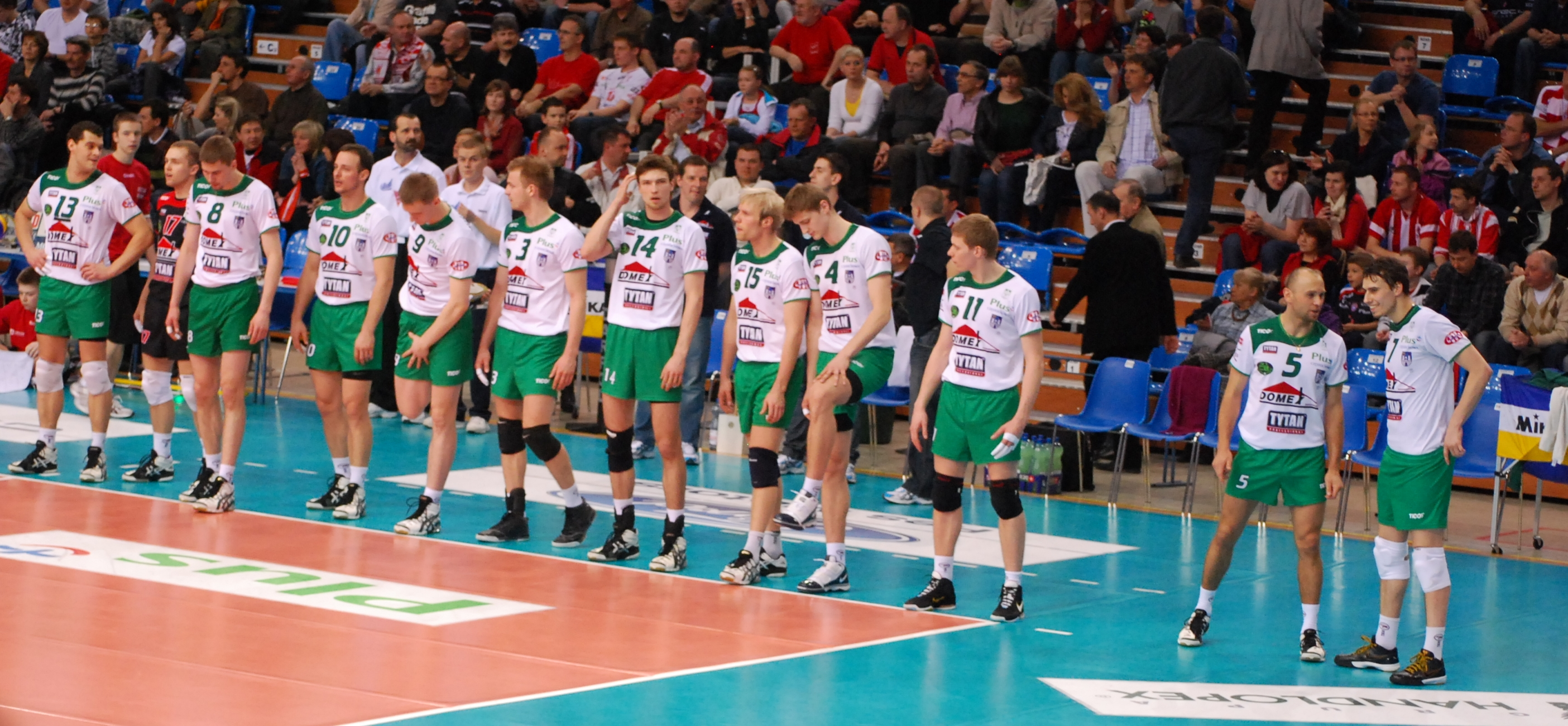 Domex Tytan AZS Częstochowa przed meczem z Asseco Resovią Rzeszów w Hali Podpromie (1 runda fazy play-off).